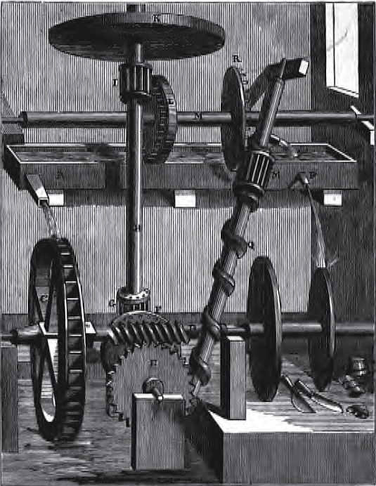 Water screw perpetum mobile